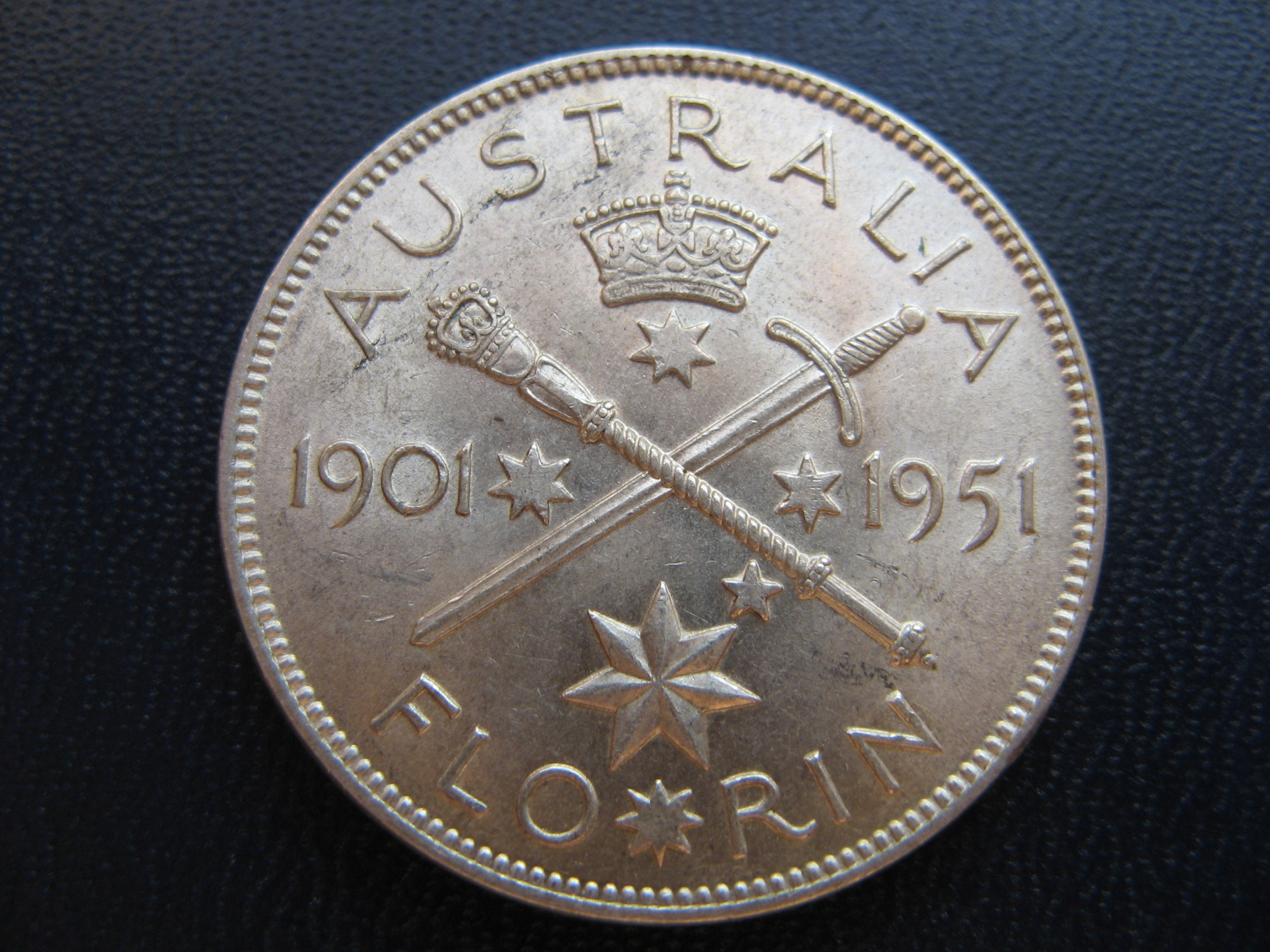 Австралийский флорин 1951 года, посвящённый 50-летию образования Австралийского союза.